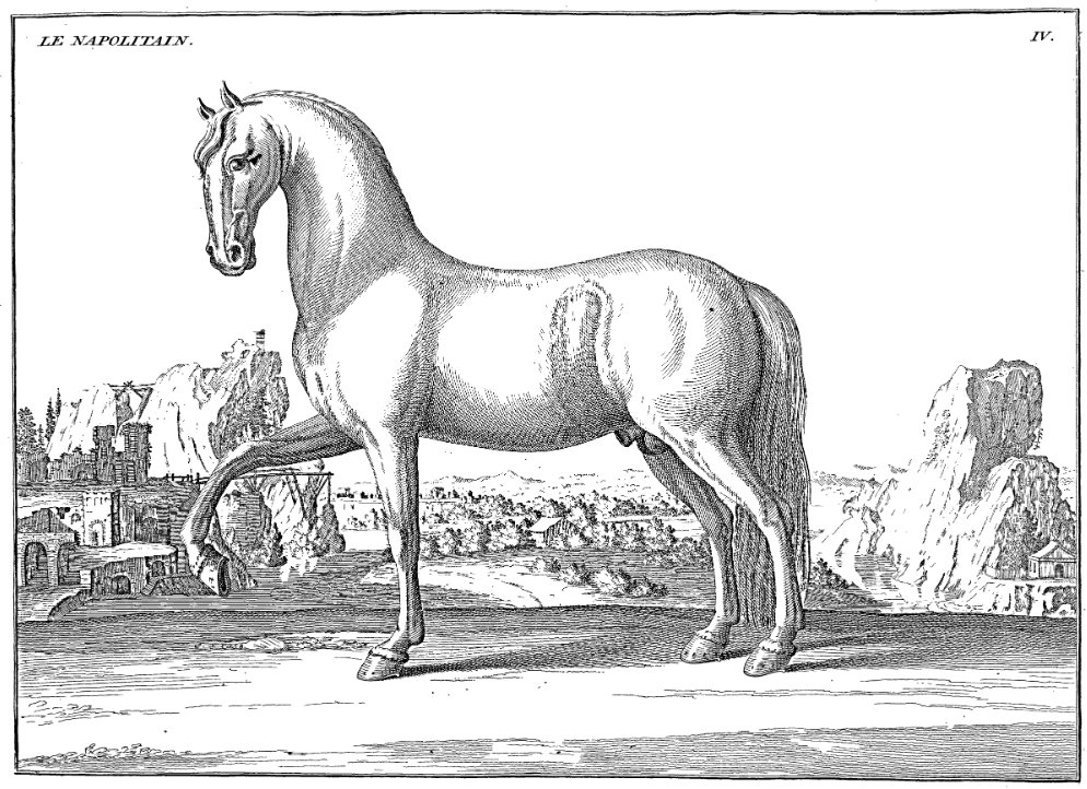 Cheval napolitain dessiné par le Baron d'Eisenberg